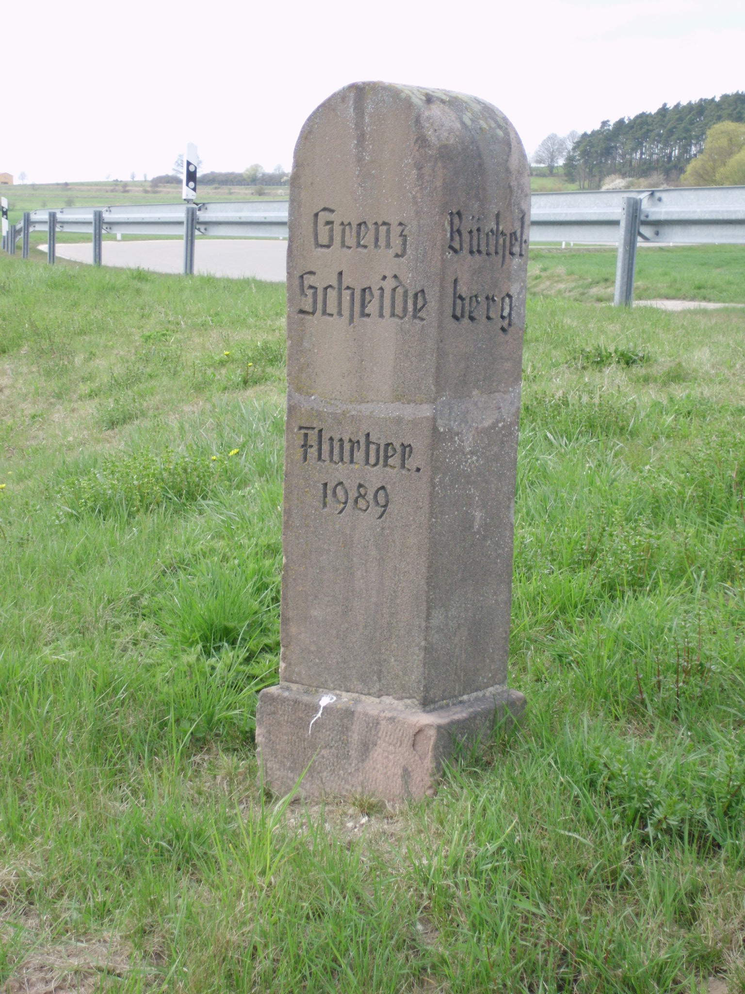 Grenzscheide Büchelberg - Neuenmuhr im mittelfränkischen Landkreis Weißenburg-Gunzenhausen